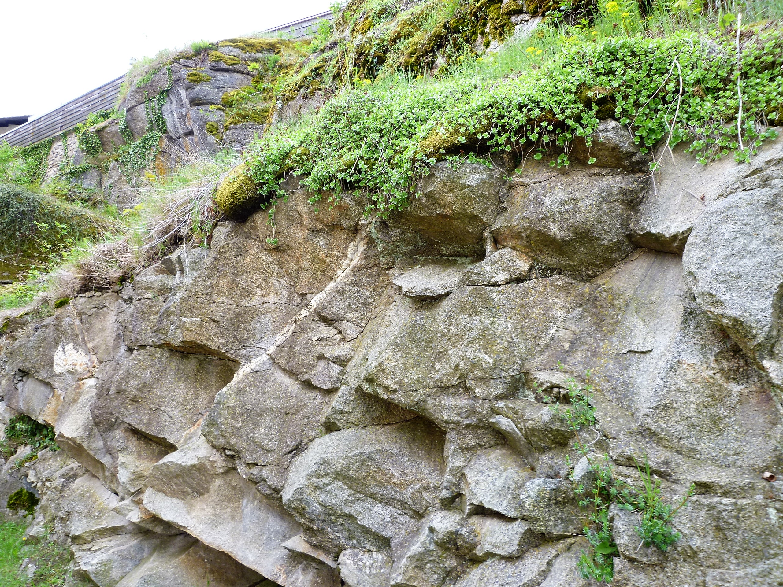 Nahaufnahme des Gesteins am Burgberg in Kollnburg. Hier treffen drei südlich des Pfahls häufige Gesteine zueinander in Kontakt. Geotop im Landkreis Regen mit der Nummer 276A001.